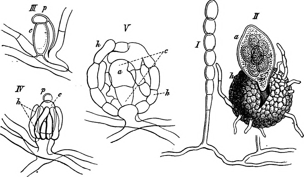 I and II:Podosphaera pannosa, III-V:Podolpheura cas-tagnei